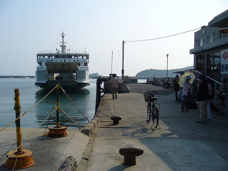 直島宮ノ浦港に入港するja:四国汽船「なおしま」